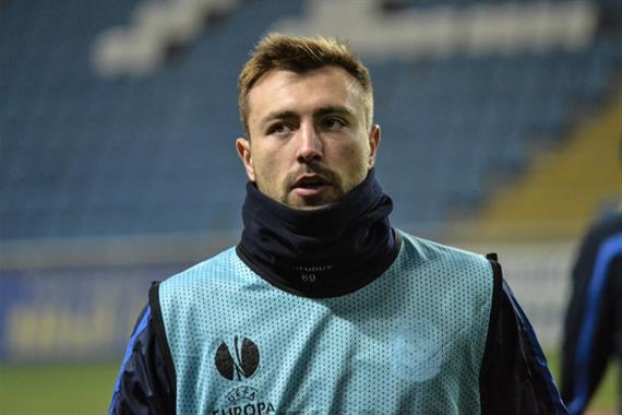 Олексій Антонов 30 листопада 2013 року під час матчу із загребським Динамо.